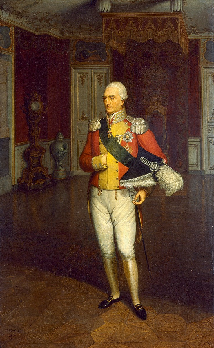 Bildnis König Friedrich August von Sachsen